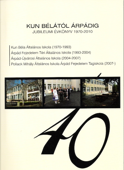 Kazincbarcikai Árpád Fejedelem Tagiskola jubileumi évkönyvének borítója, 1970-2010